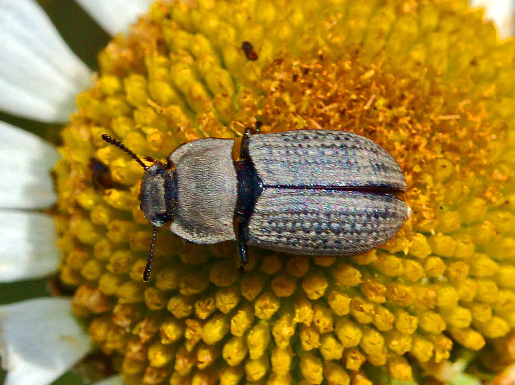 Tenebrionidae - "Gonocephalum cf. assimile" - Cerreto Ratti, Alessandria, Italy